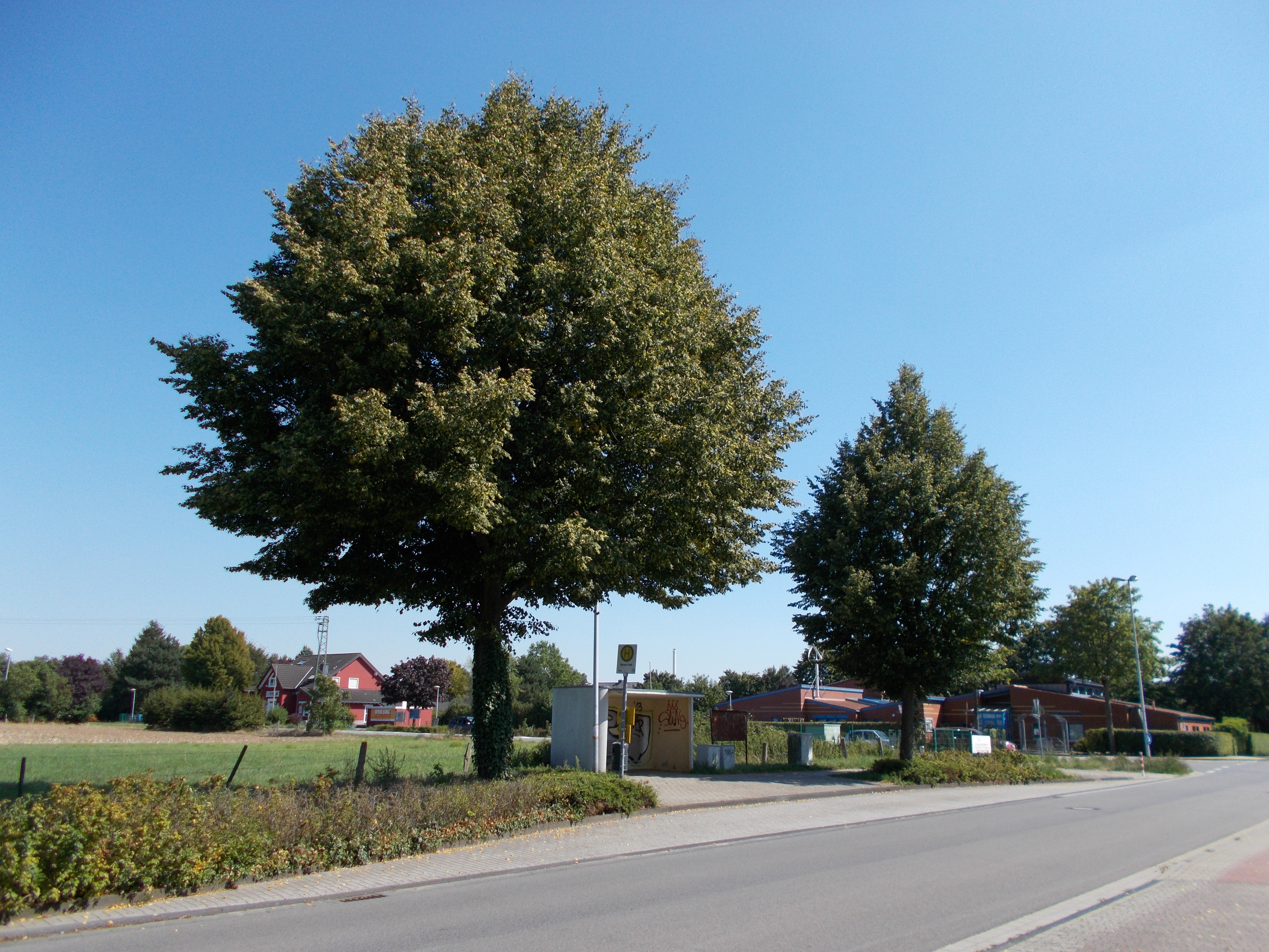 Rheinberg-Alpsray Bushaltestelle Alpsrayer Straße